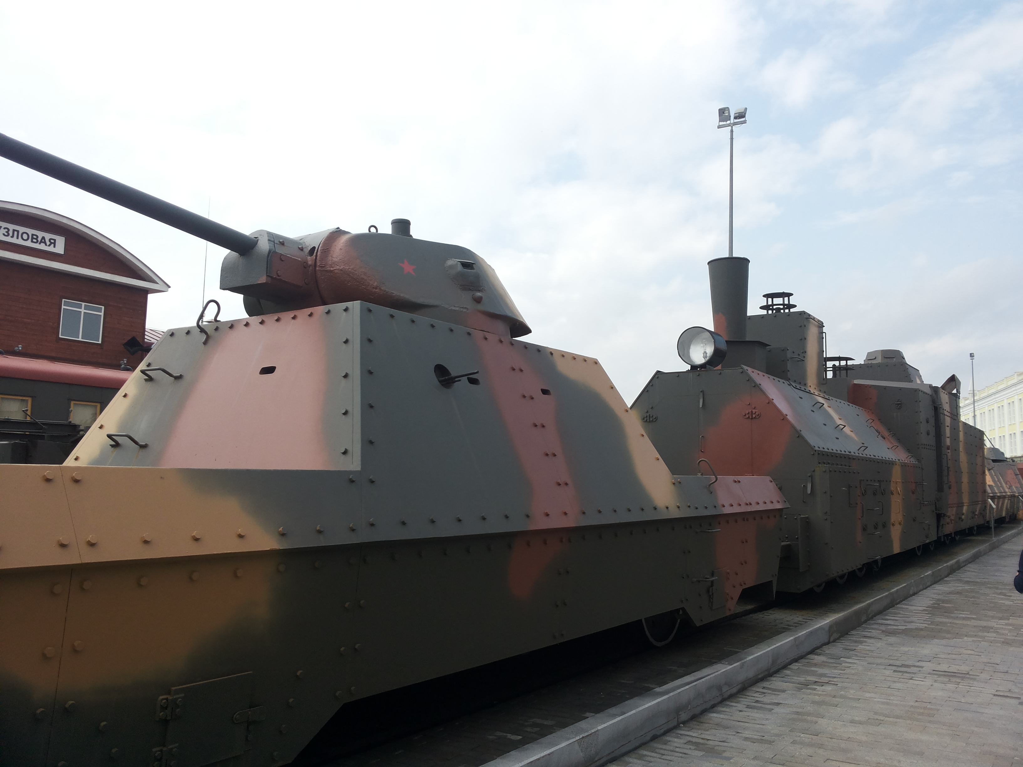 Музей военной техники «Боевая слава Урала»